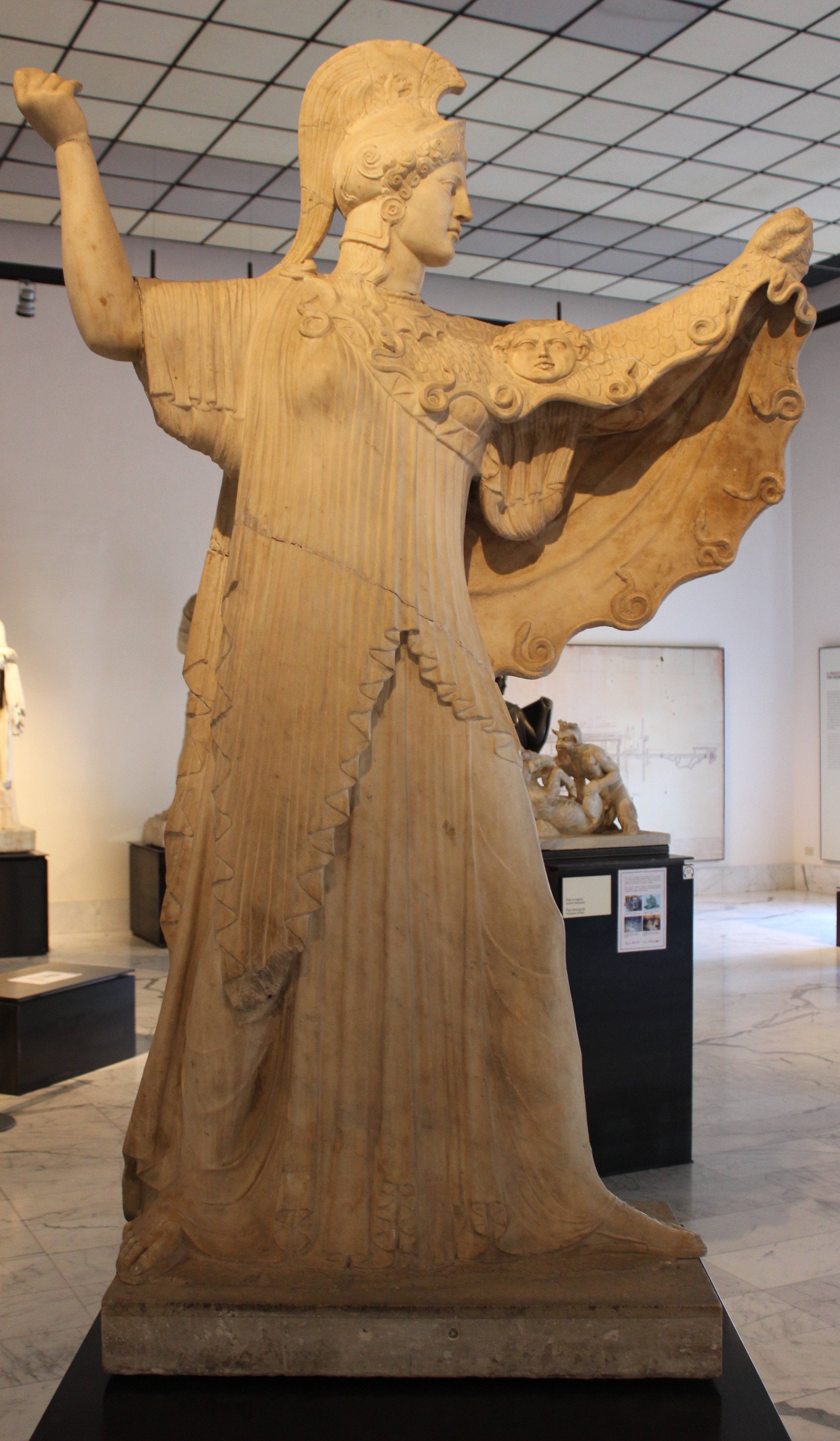 Nápoles. Museo Archeologico Nazionale. Estatua procedente de la Villa dei Papiri en Herculano.